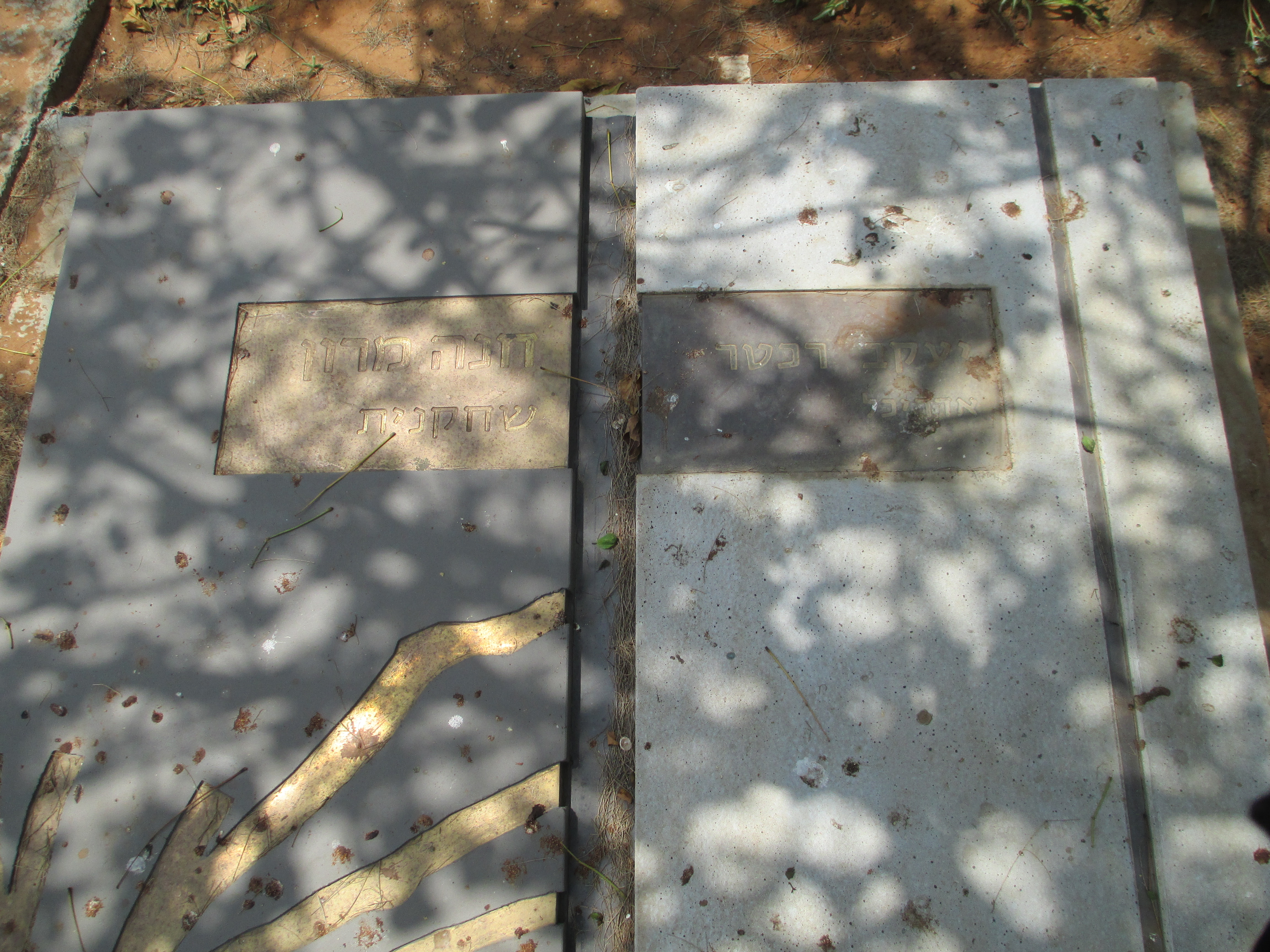 קבר יעקב רכטר (מימין) וחה מרון בשפיים